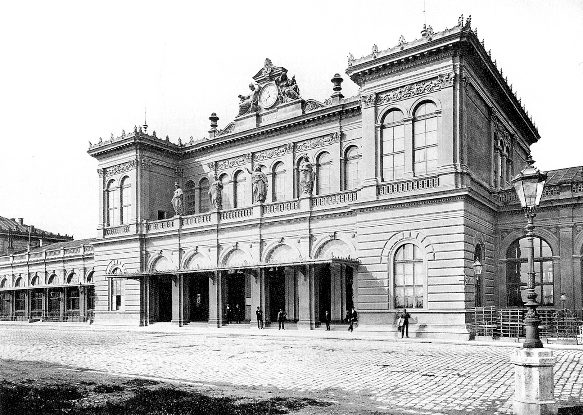 Der Wiener Staatsbahnhof (ab 1918: Ostbahnhof) um 1880